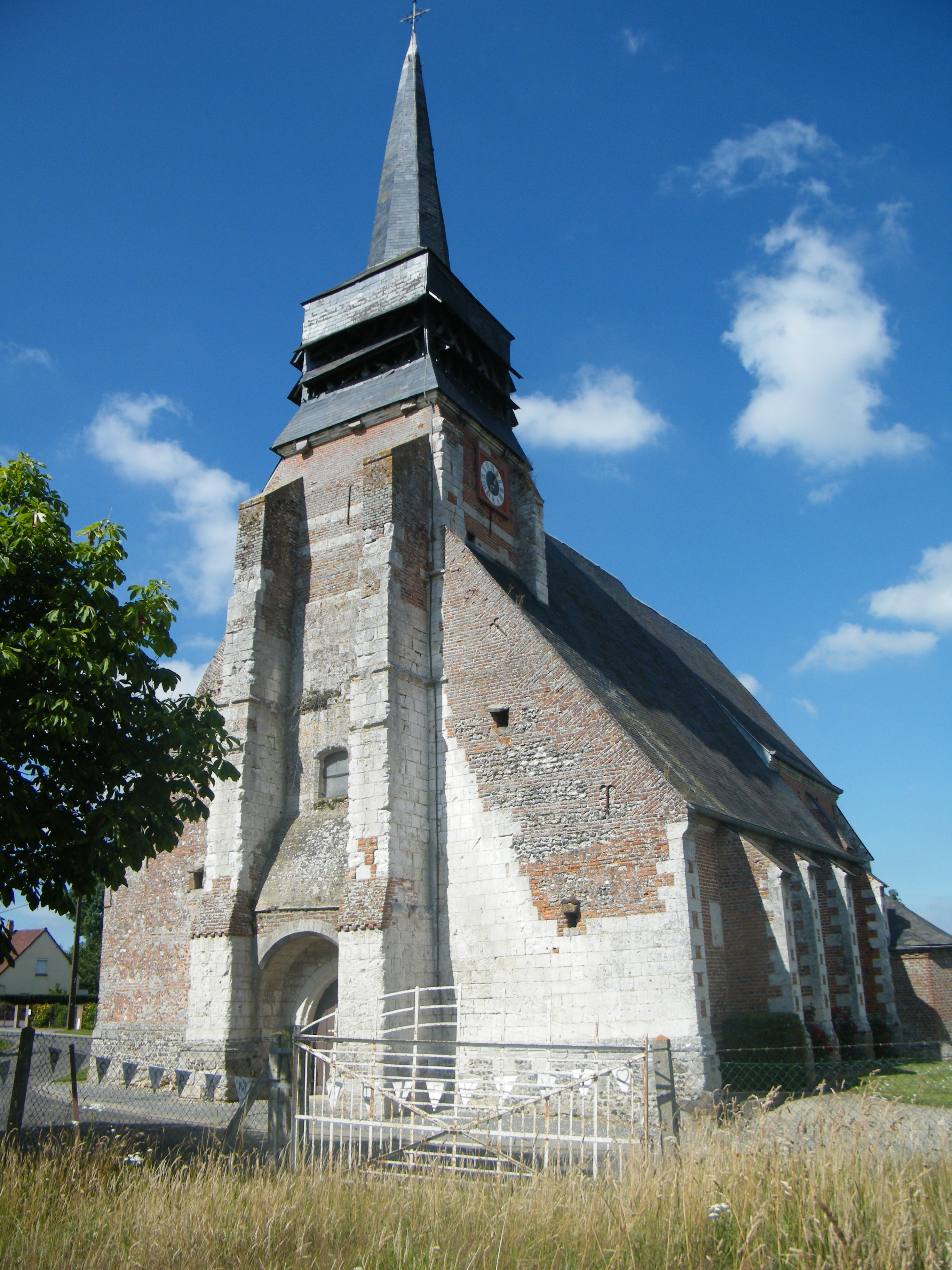 Doudelainville, Somme, France, église (7)